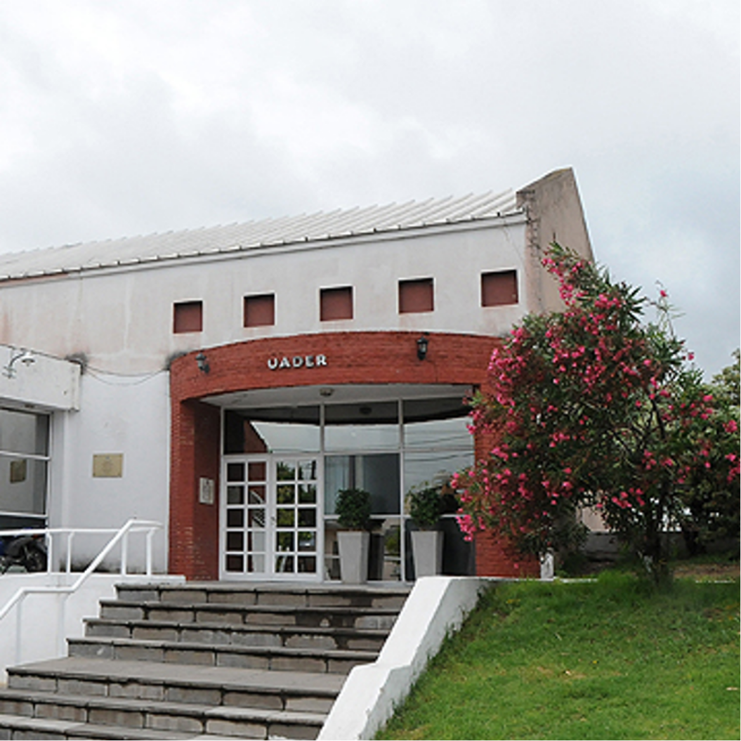 Edificio del Rectorado frente a Av. Gral. Francisco Ramírez en Paraná (E.R.)